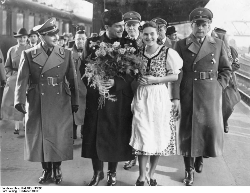 Der italienische Arbeitsführer Cianetti traf heute vormittag auf dem Anhalter Bahnhof ein und wurde von Stabsleiter Simon in Vertretung von Dr. Ley begrüsst. Cianetti beim Verlassen des Bahnsteiges, zu seiner Linken ein Mädchen, das ihm den Begrüssungsstrauss überreichte, ganz rechts Stabsleiter Simon und hinter Cianetti Pressechef der DAF Walter Kiehl Fot.: Ho 15.10.1938